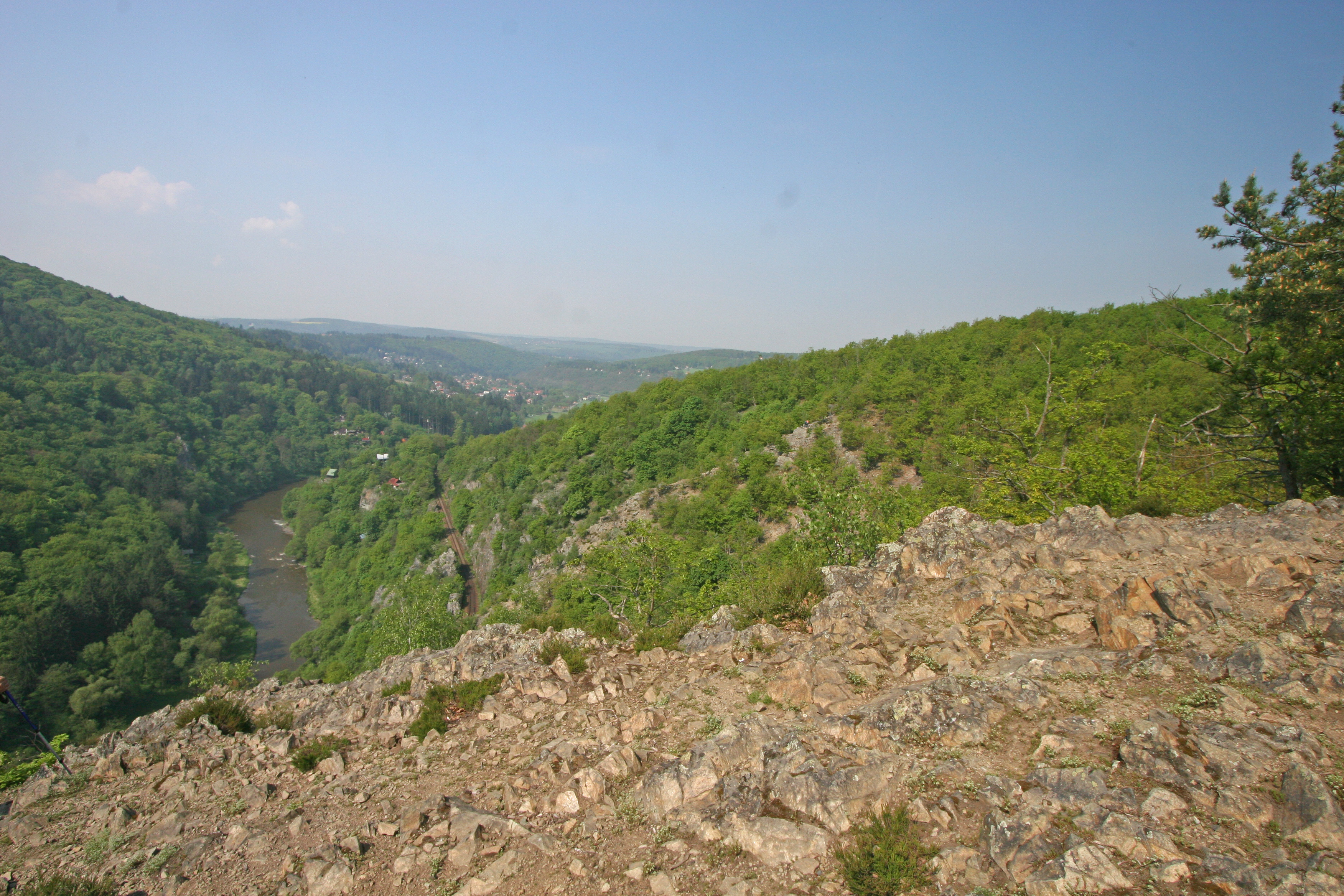 Vyhlídka Třeštibok